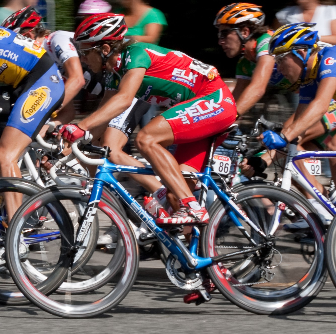 Clemens Fankhauser (Post Danmark Rundt 2008)